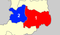 Χάρτης των δημοτικών ενοτήτων (πρώην δήμων και κοινοτήτων) του Δήμου Διδυμοτείχου. Διδυμοτείχου Μεταξάδων